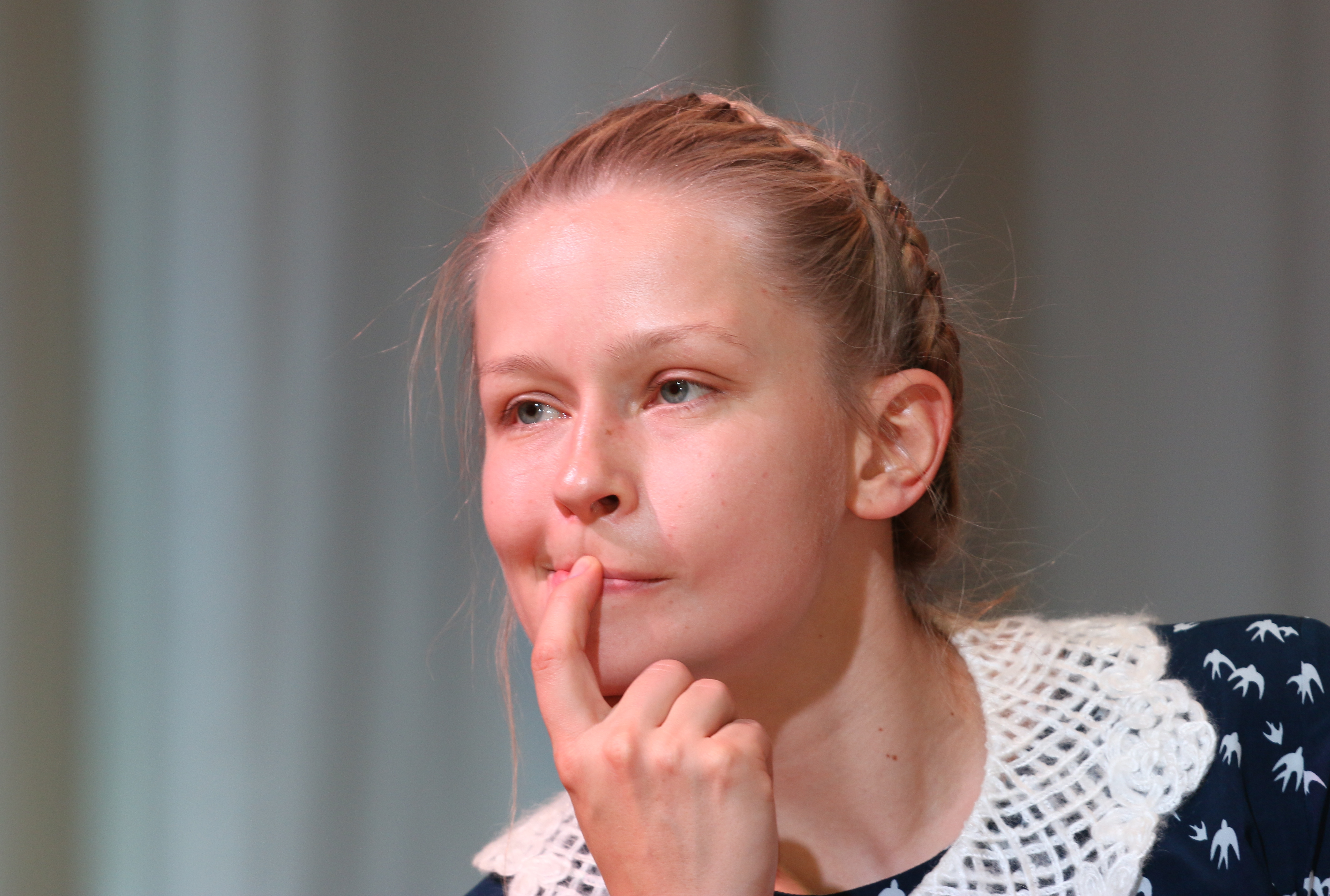 Юлия Пересильд -российская актриса. Снято в Российской государственной детской библиотеке.